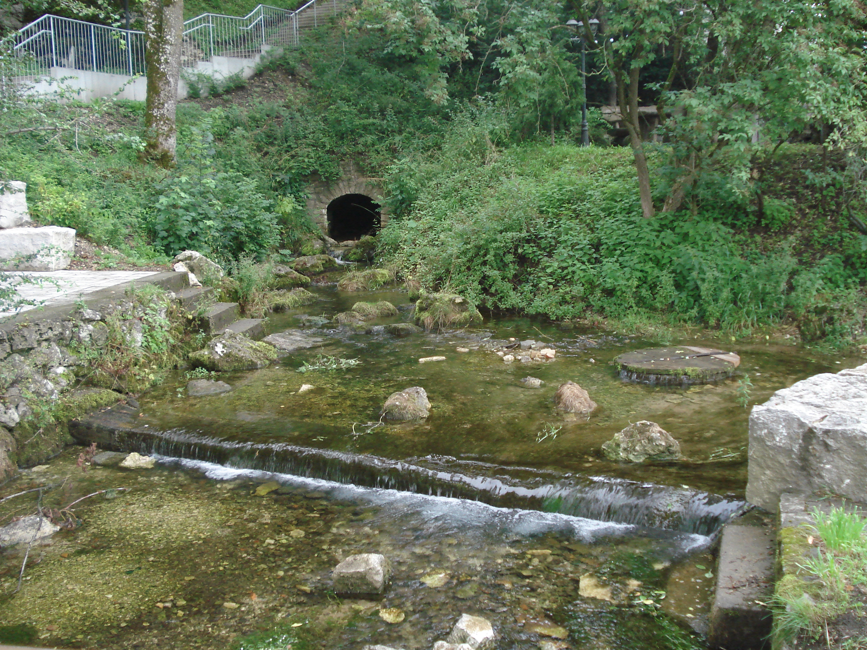 Die Erpfquelle im Sommer